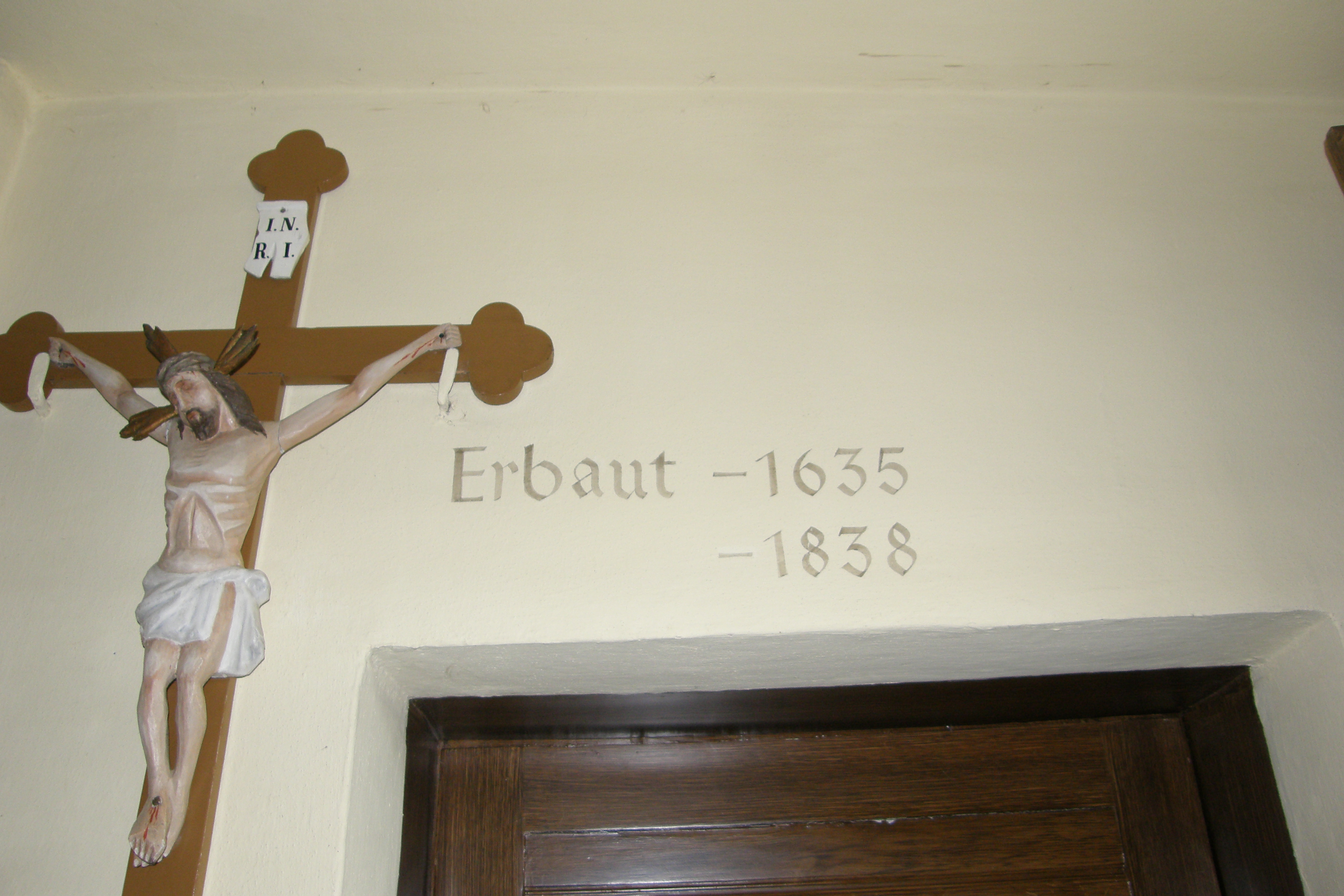 Kath. Filialkirche hl. Johannes Nepomuk